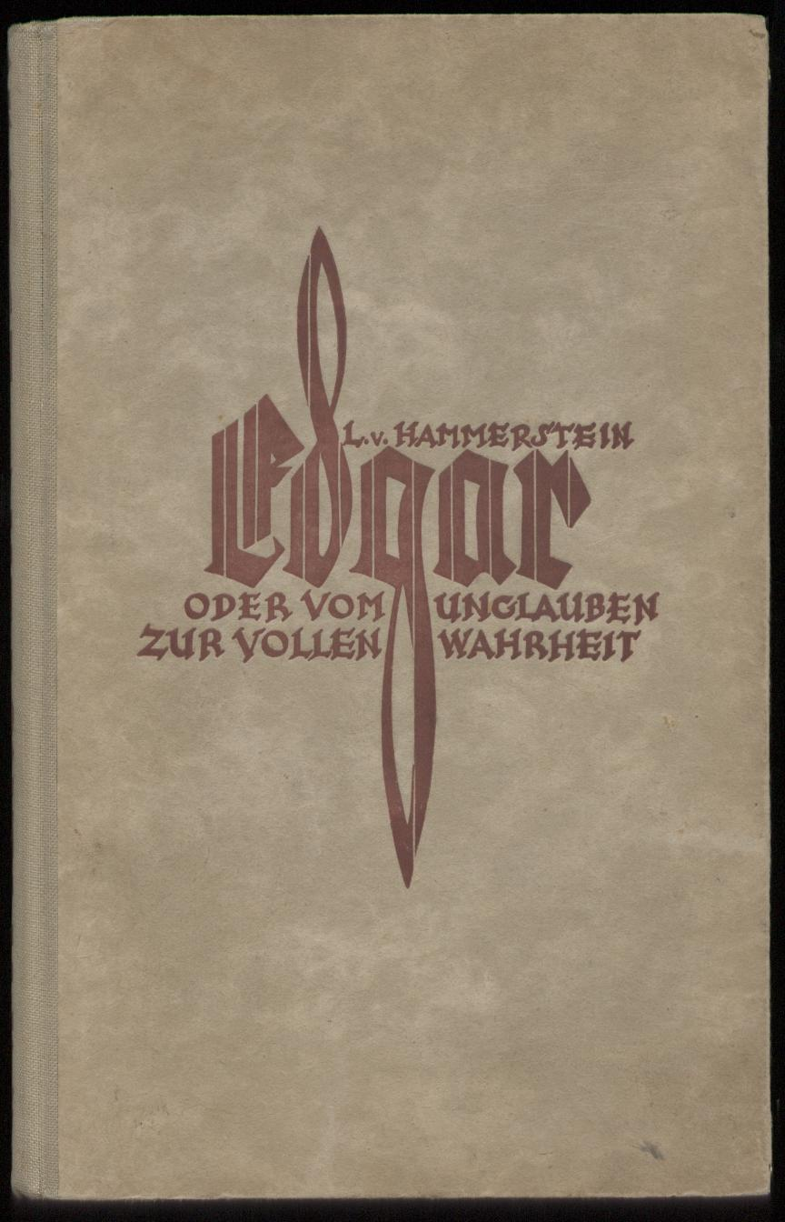 Ludwig von Hammerstein (1832-1905), deutscher Jesuit und Buchautor, Buchcover, 1928